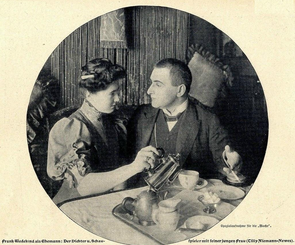 Frank Wedekind mit seiner Frau Tilly Niemann-Newes, 1906